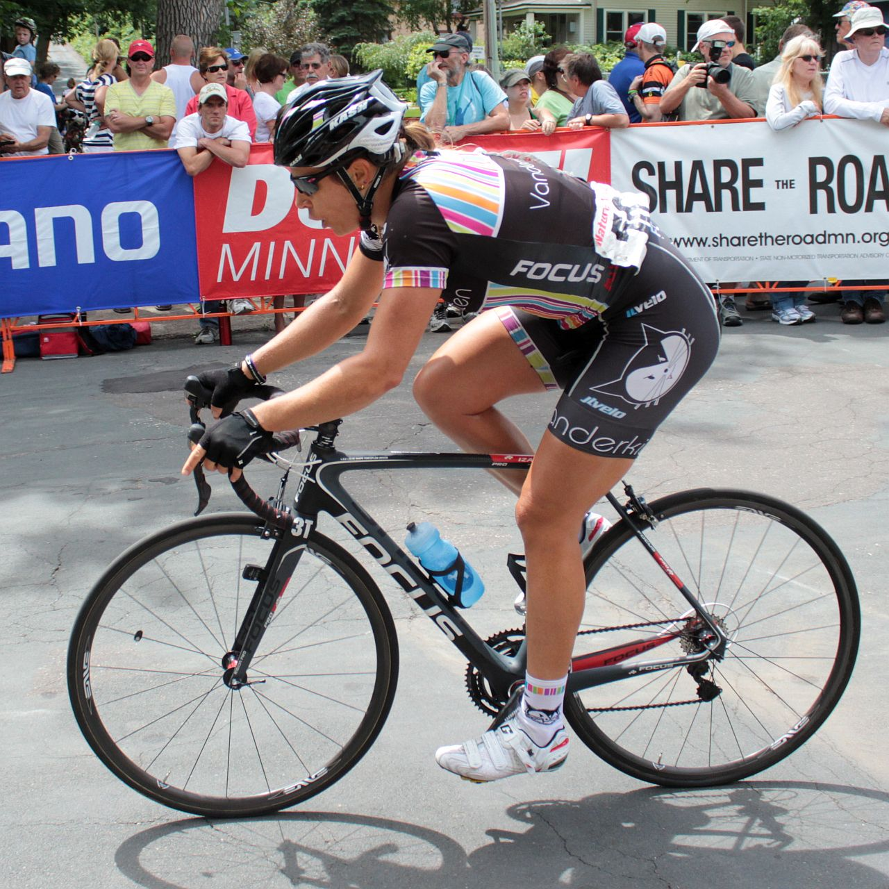 Bridie O'Donnell